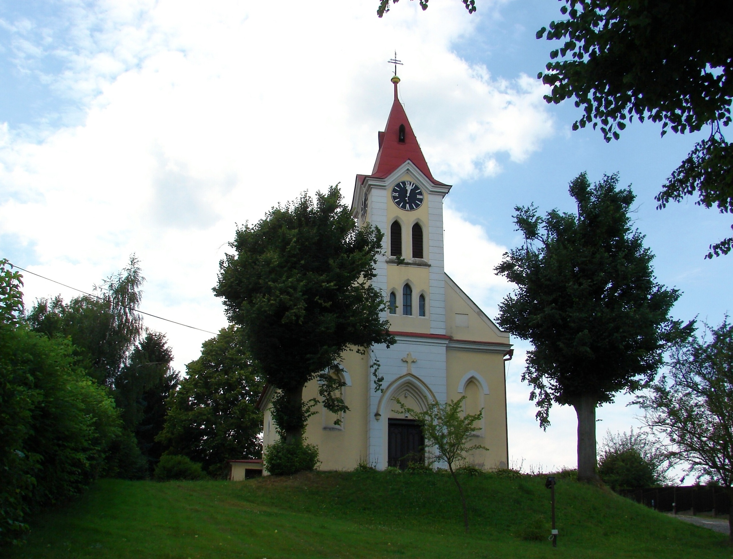 Kostel v Ohnišově, jedna z dominant obce.